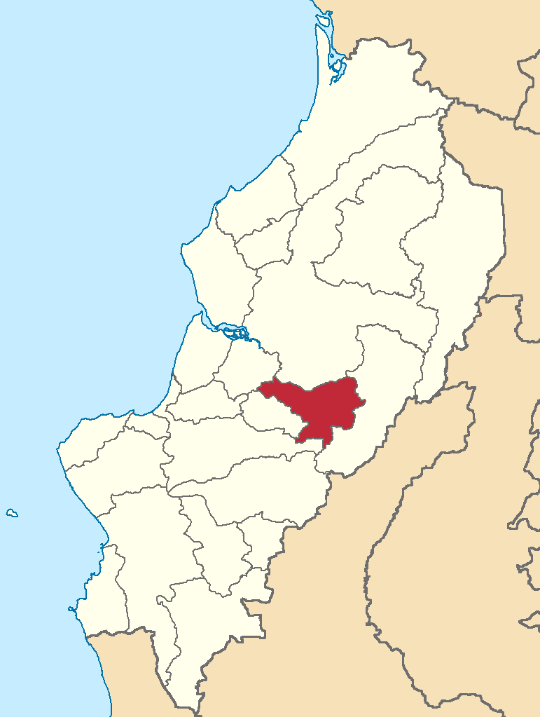 Mapa localizador del cantón en Manabí, Ecuador